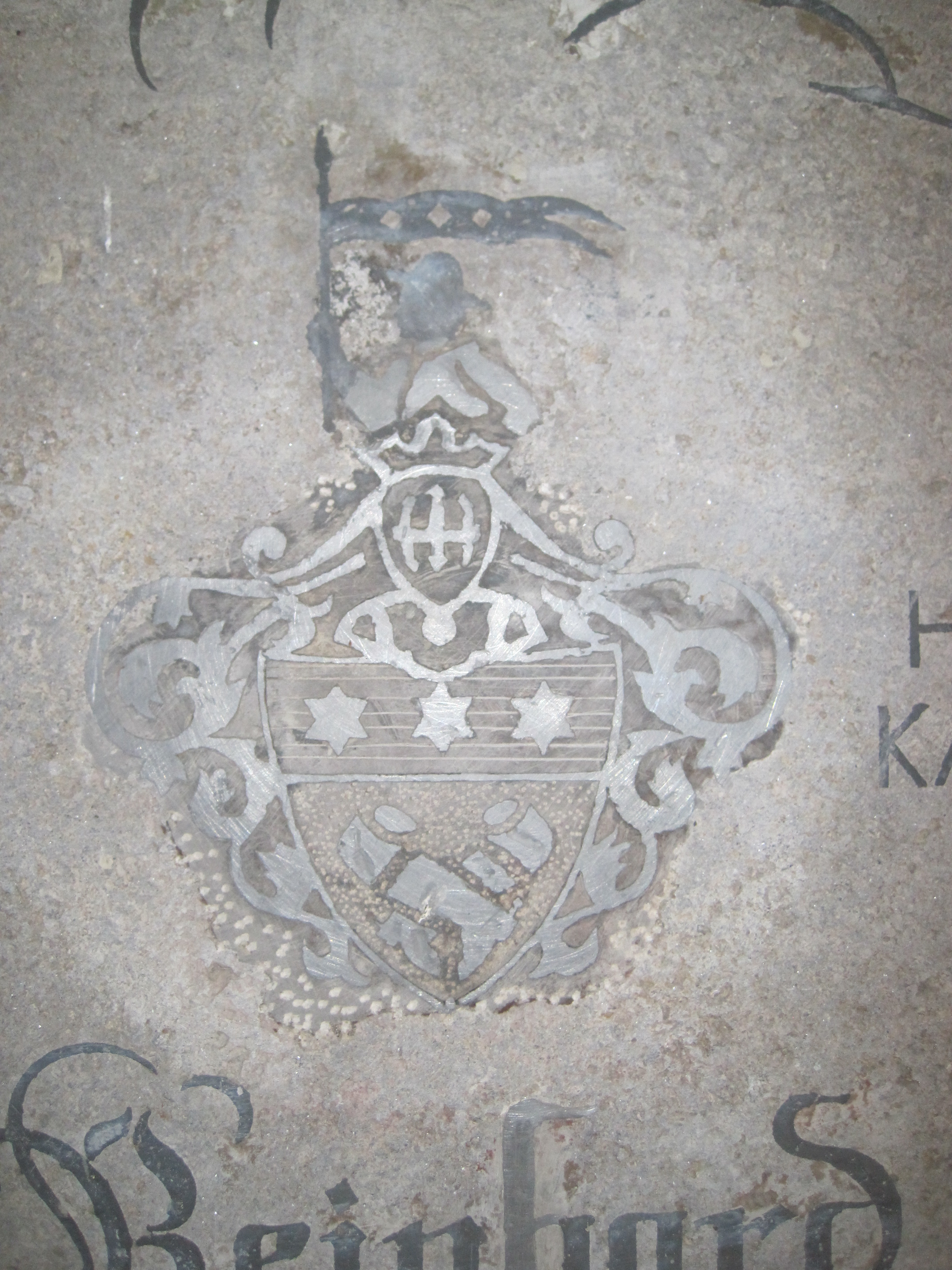 Johanniter-Kirche Groß Eichsen, Detail Grabplatte (Wappen)